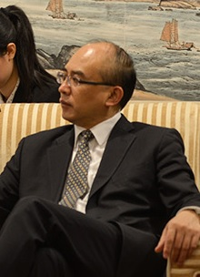 2014年6月19日，时任深圳市长的许勤会见外宾。